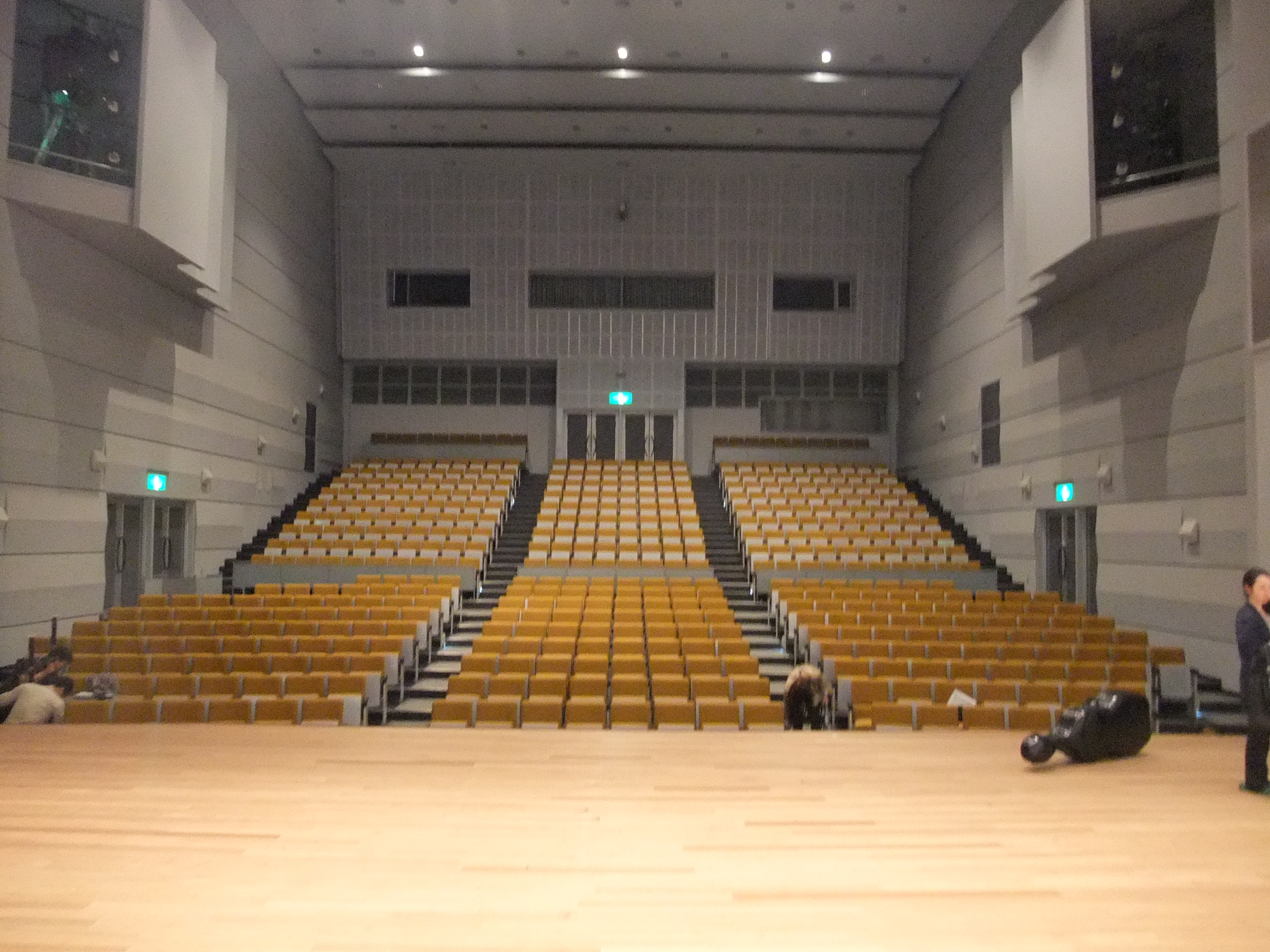 福山市沼隈町のサンパルホール